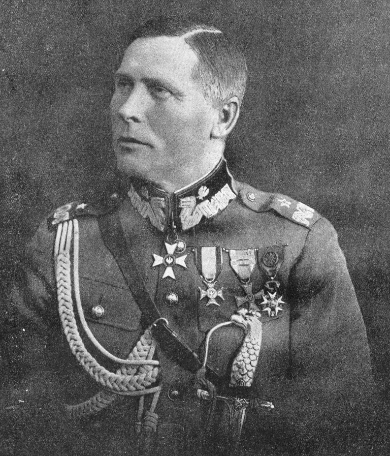 Generał brygady inż. Andrzej Galica